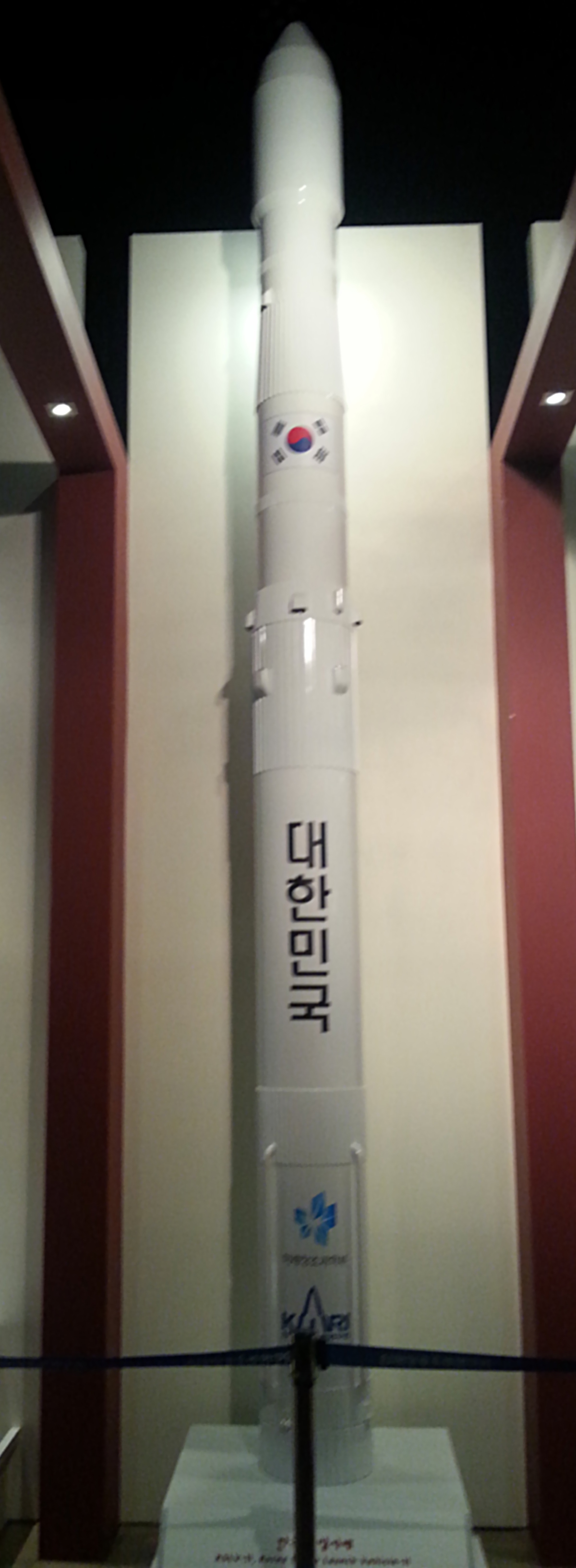 대한민국 전남 고흥 나로우주센터 우주과학관에 전시된 한국형발사체 모형